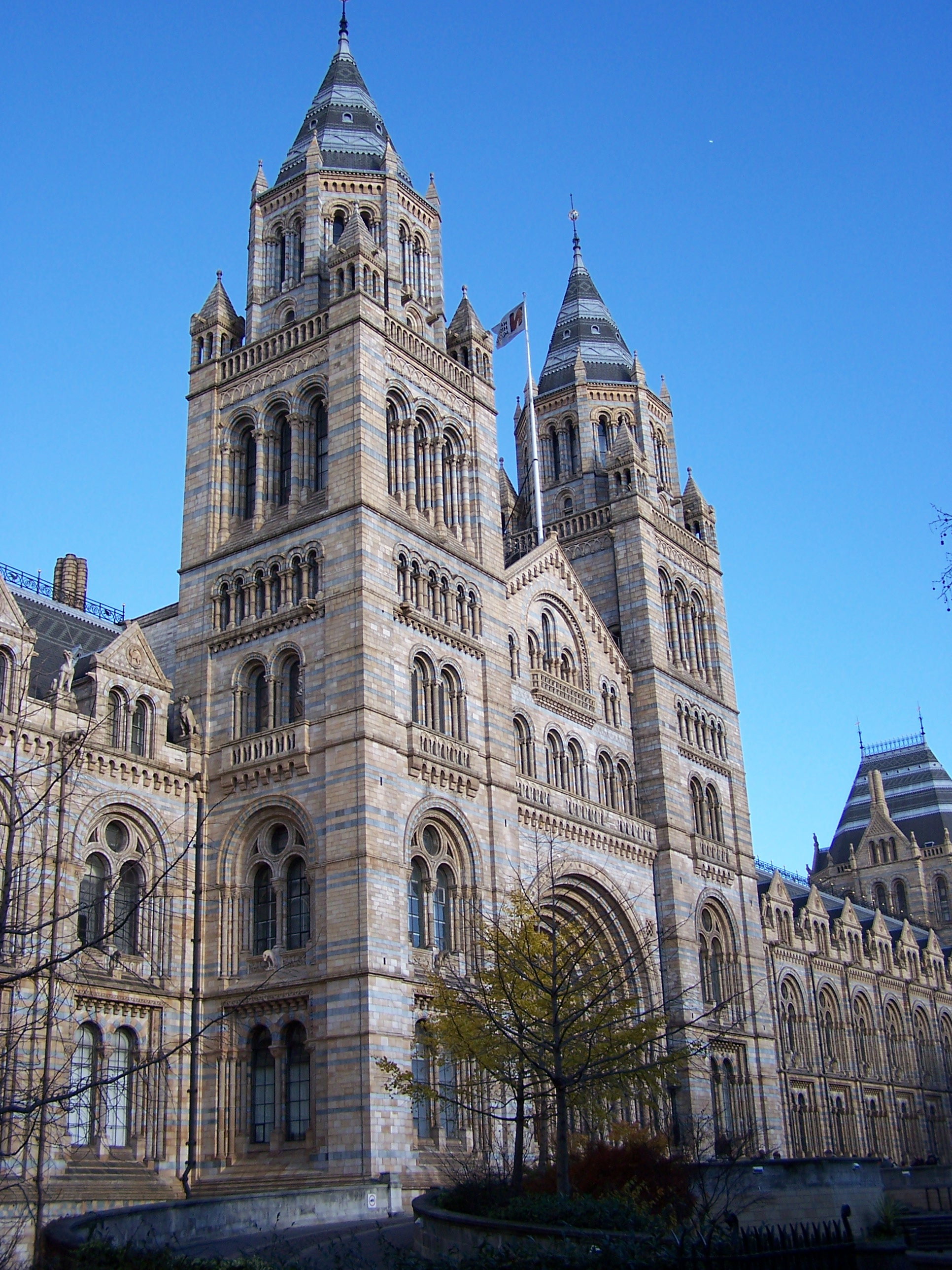 Façade du Natural History Museum de Londres